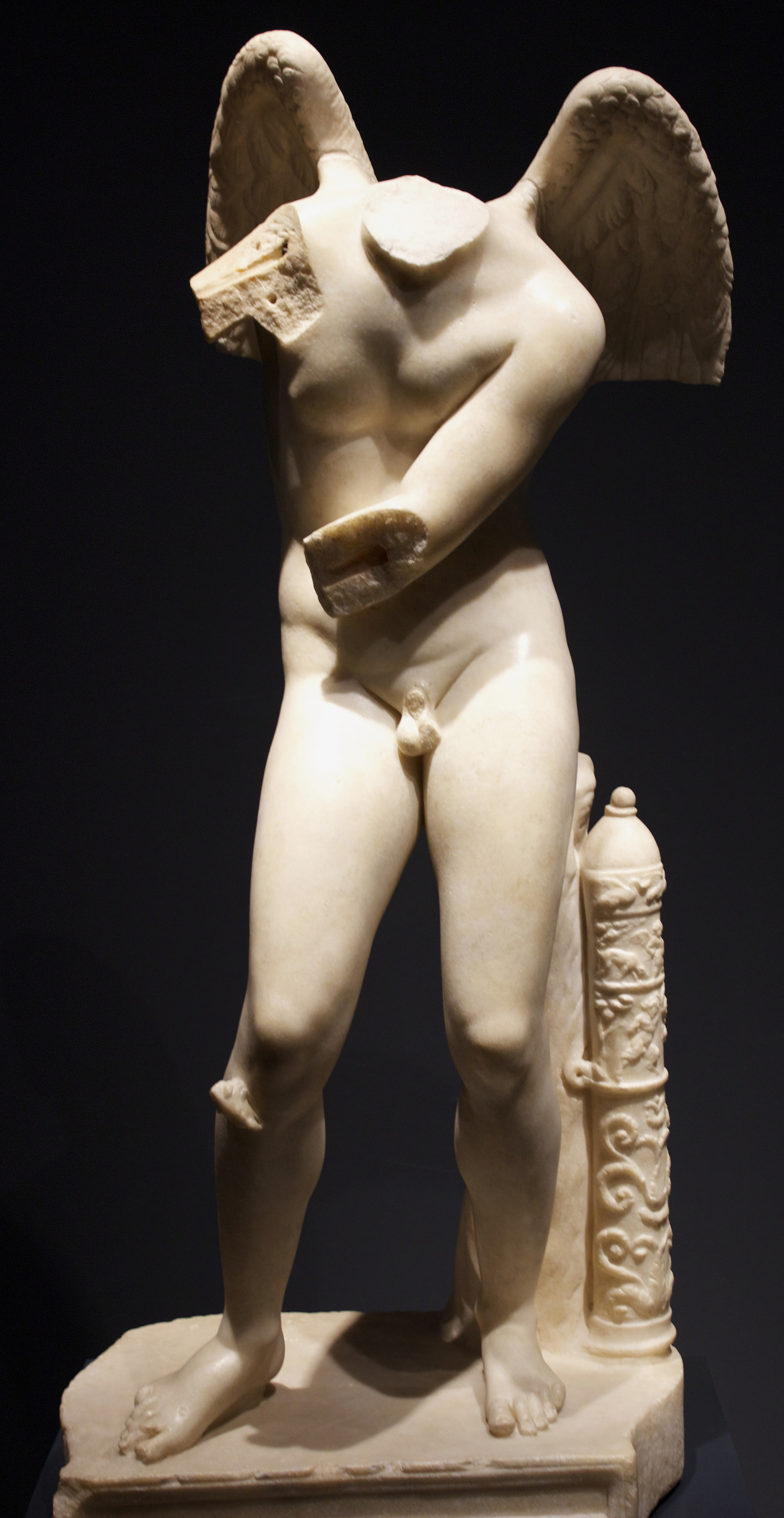 Roma. Palazzo Massimo alle Terme. Eros tipo Tespie.